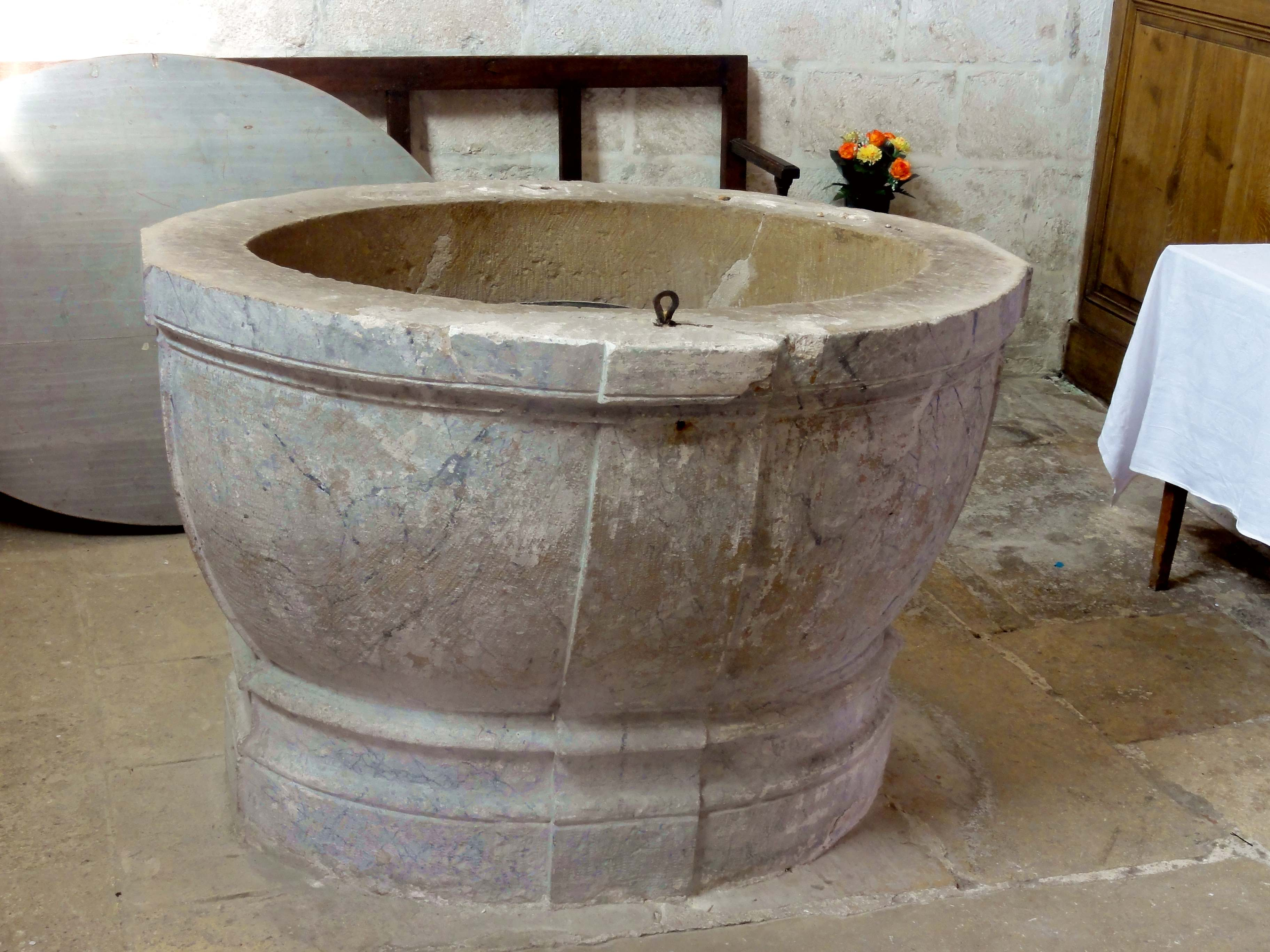 Fonts baptismaux.